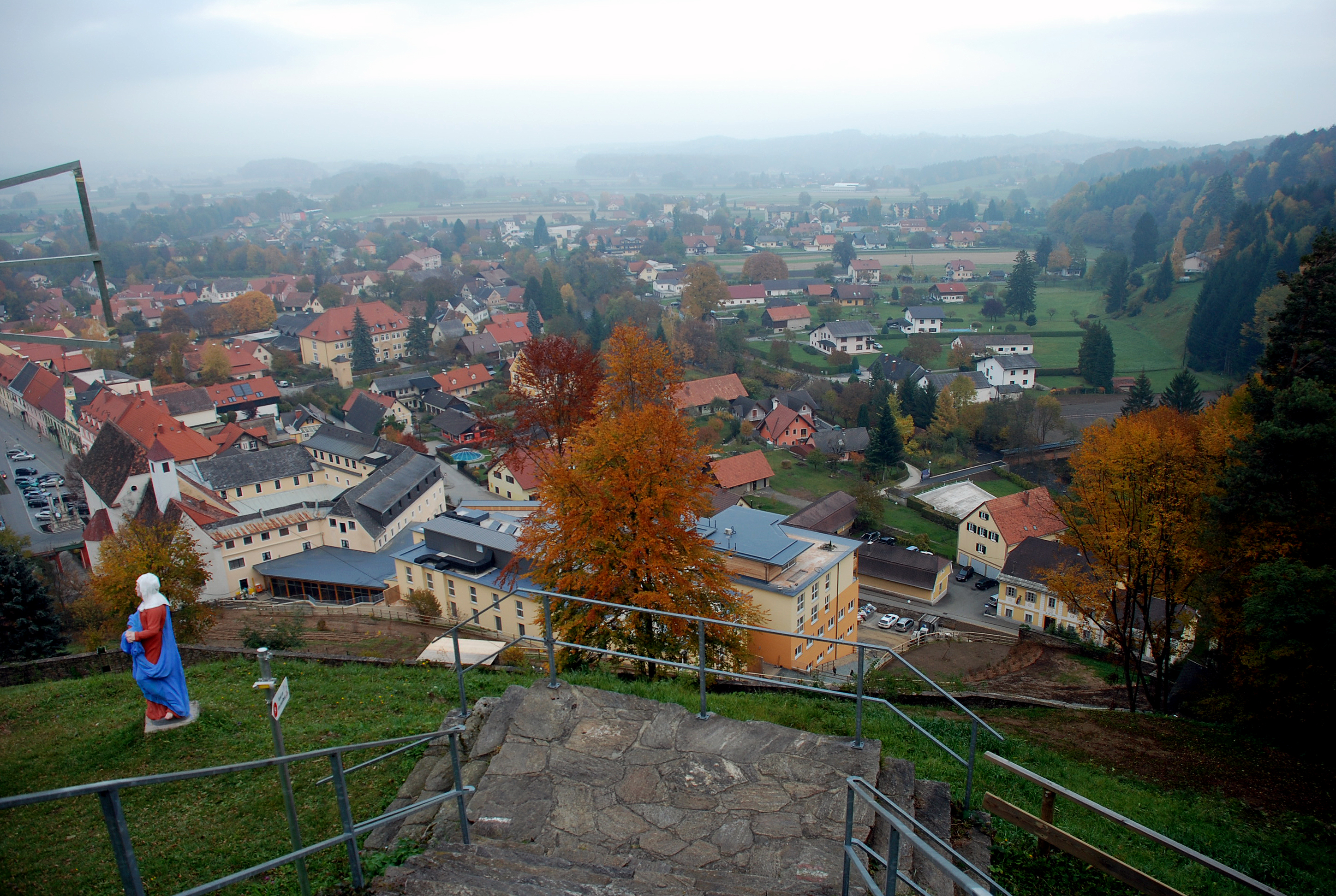 Schwanberg, Steiermark, Österreich, Blick auf die Stadt, im Vordergrund die Gebäude des ehem Kapuzinerklosters